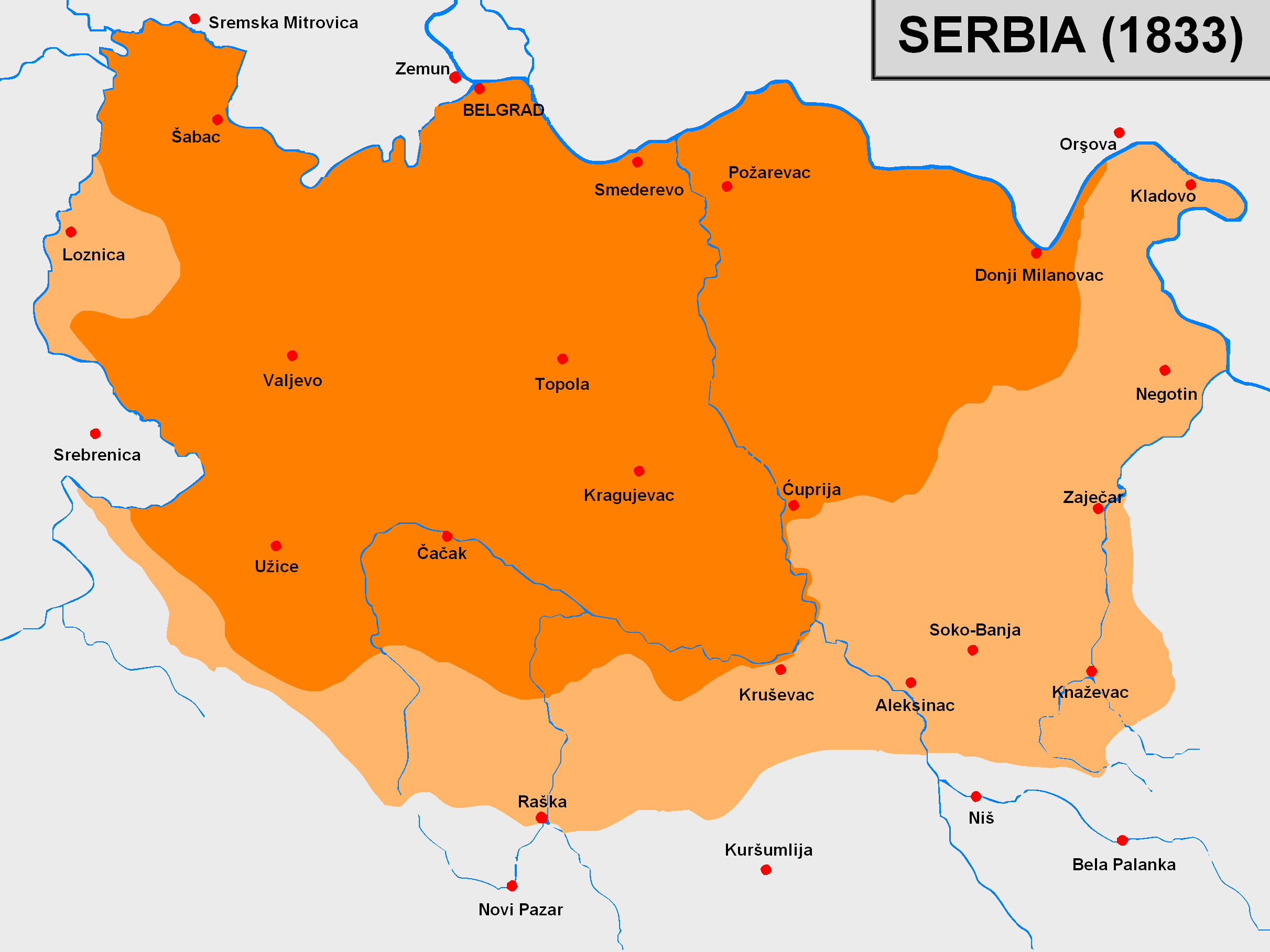 Сърбия (Белградски пашалък) след Второто сръбско въстание и анексираните територии през 1831-1833 г.